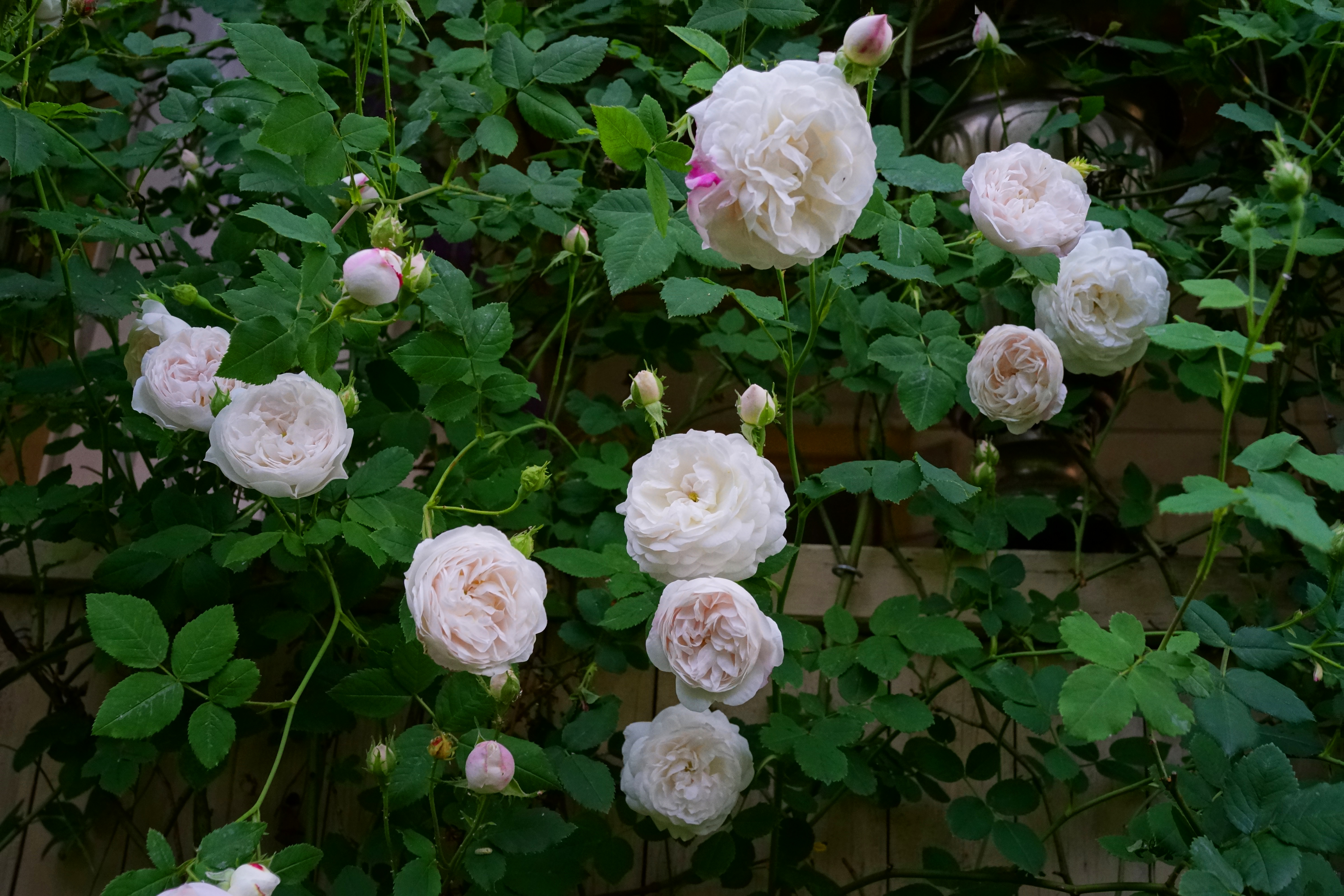 Россия, Владимирская область, частный сад